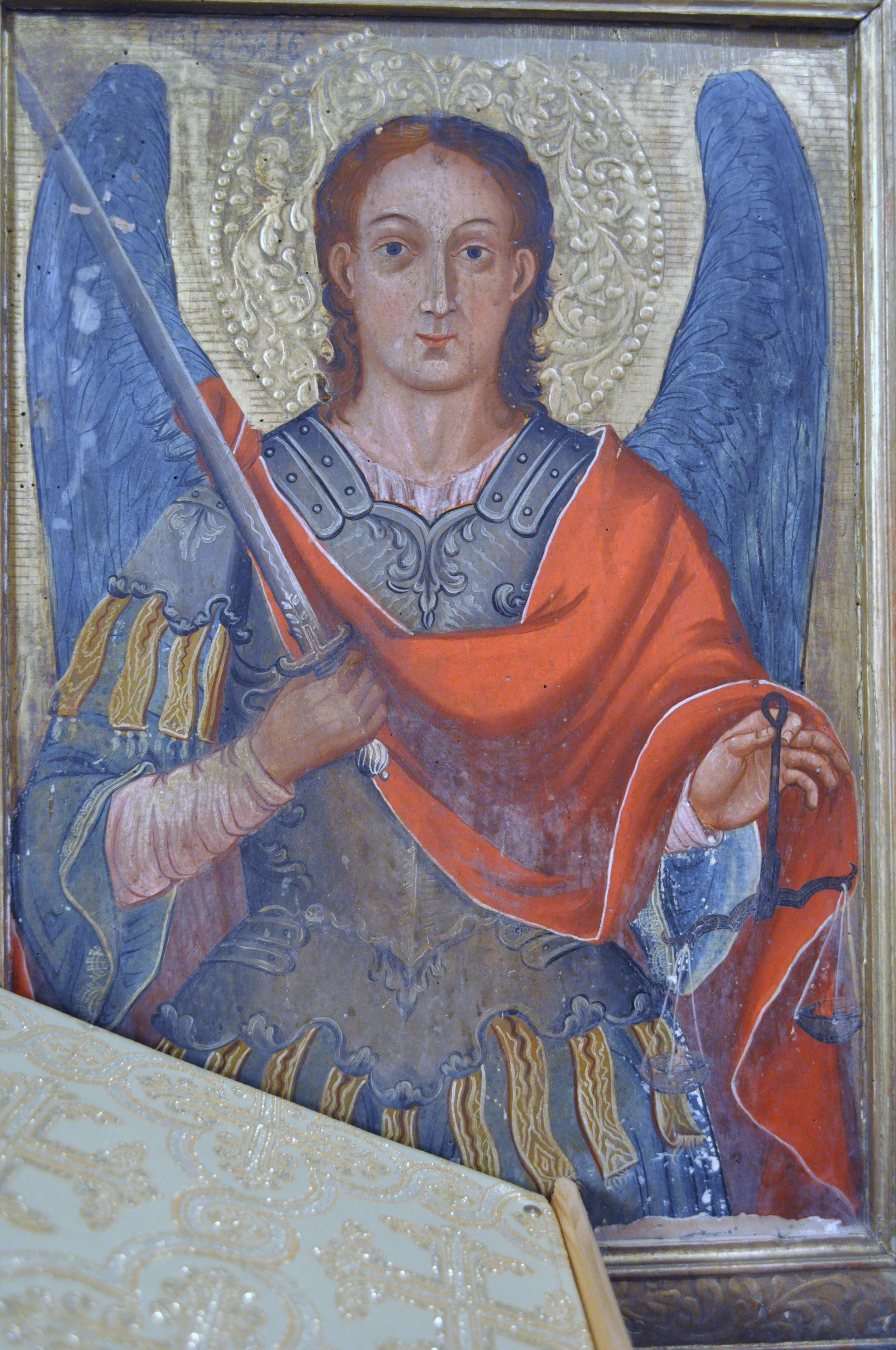 Biserica de lemn „Adormirea Maicii Domnului”,sat STĂNIJA; comuna BUCEŞ